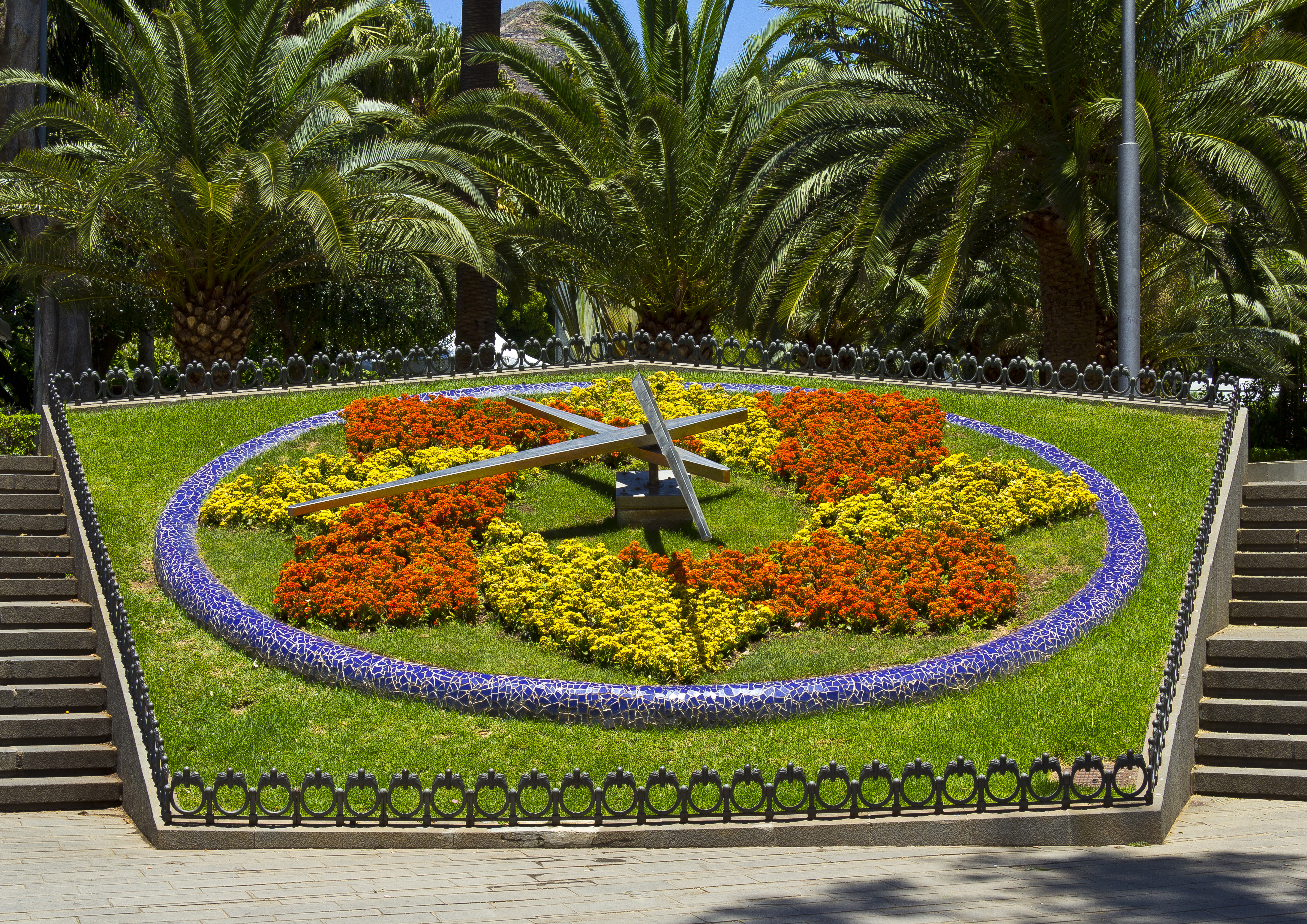 Die Uhr befindet sich am östlichen Eingang des Parque García Sanabria in Santa Cruz de Tenerife.